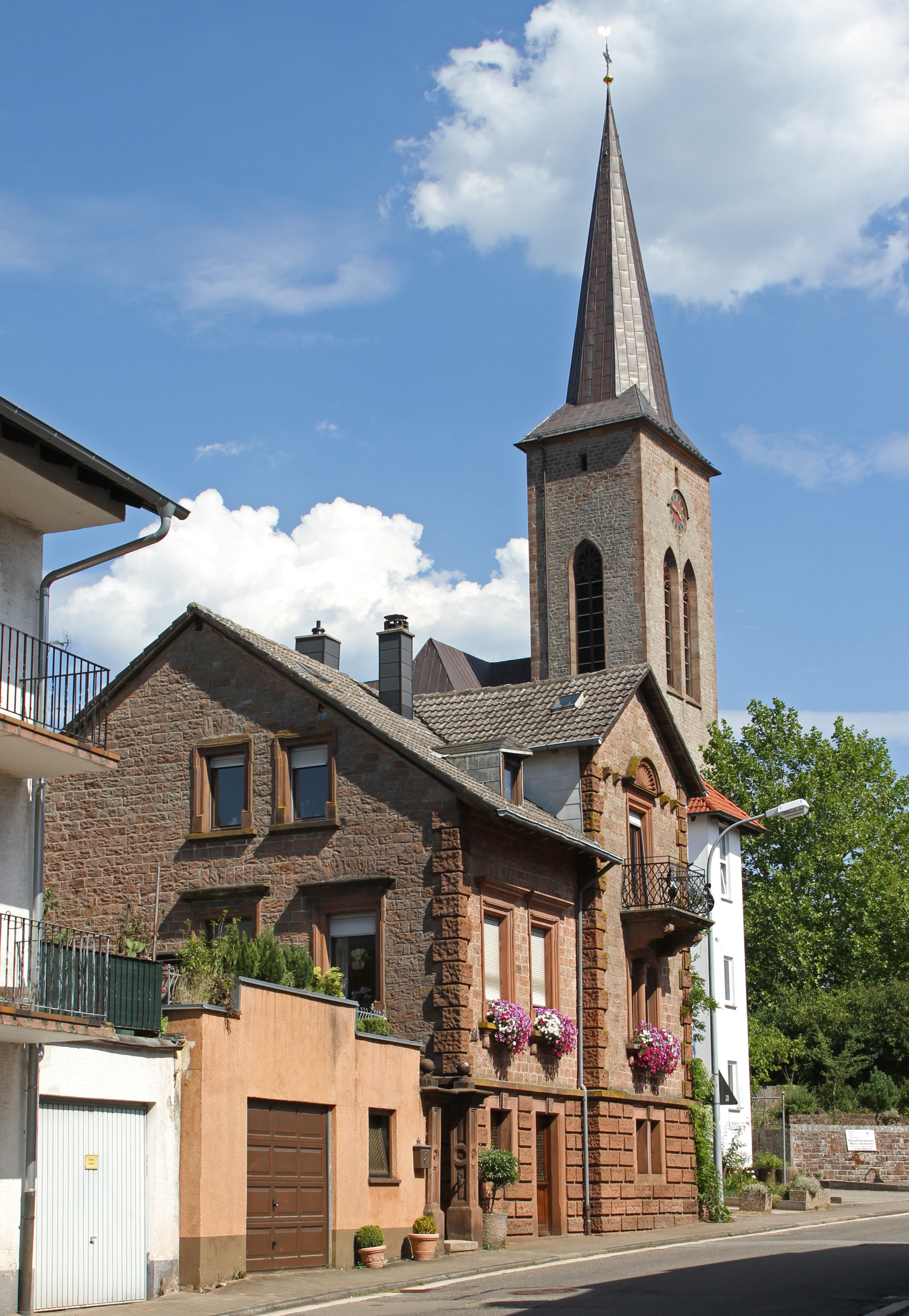 Clausen, Hauptstraße 61